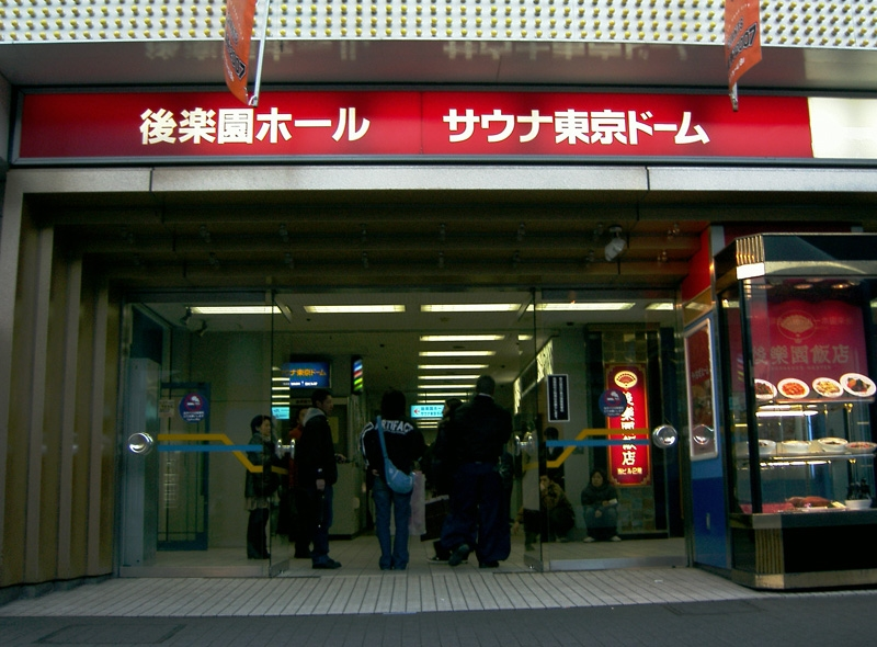 Korakuen_Hall Tokyo Japan